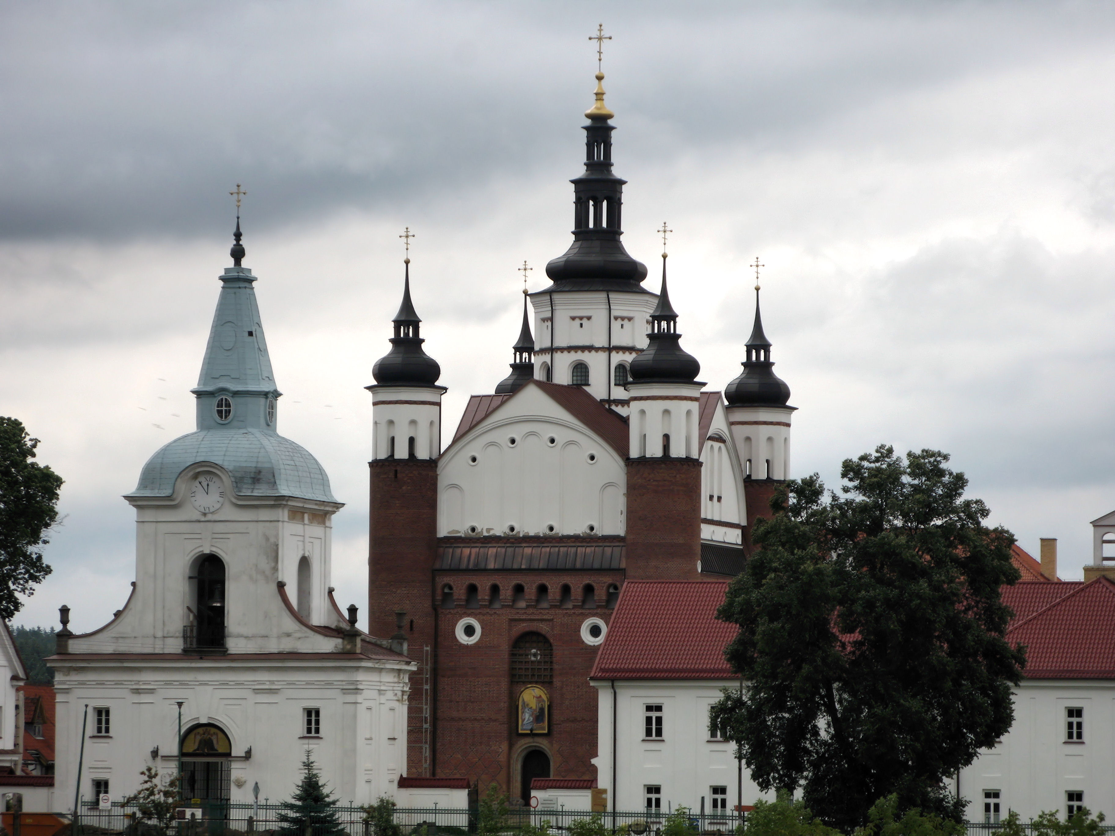 cerkiew p.w. św. Jana Teologa w zespole klasztornym bazylianów budynek południowy klasztoru w zespole klasztornym bazylianów budynek północno-zachodni klasztoru w zespole klasztornym bazylianów Supraśl, ul. Kościuszki, Supraśl 02.1953.